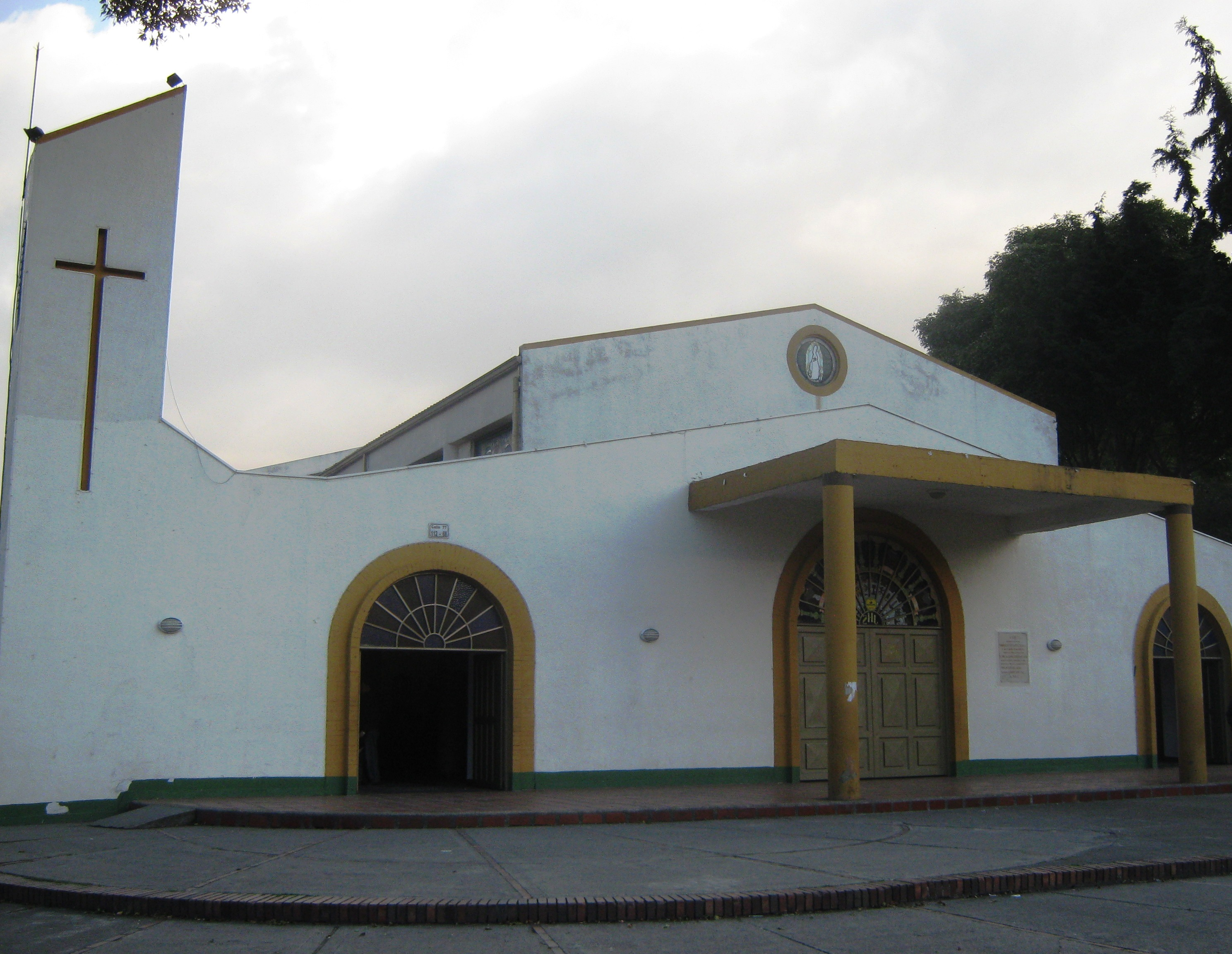 Iglesia del barrio Villas de Granada.